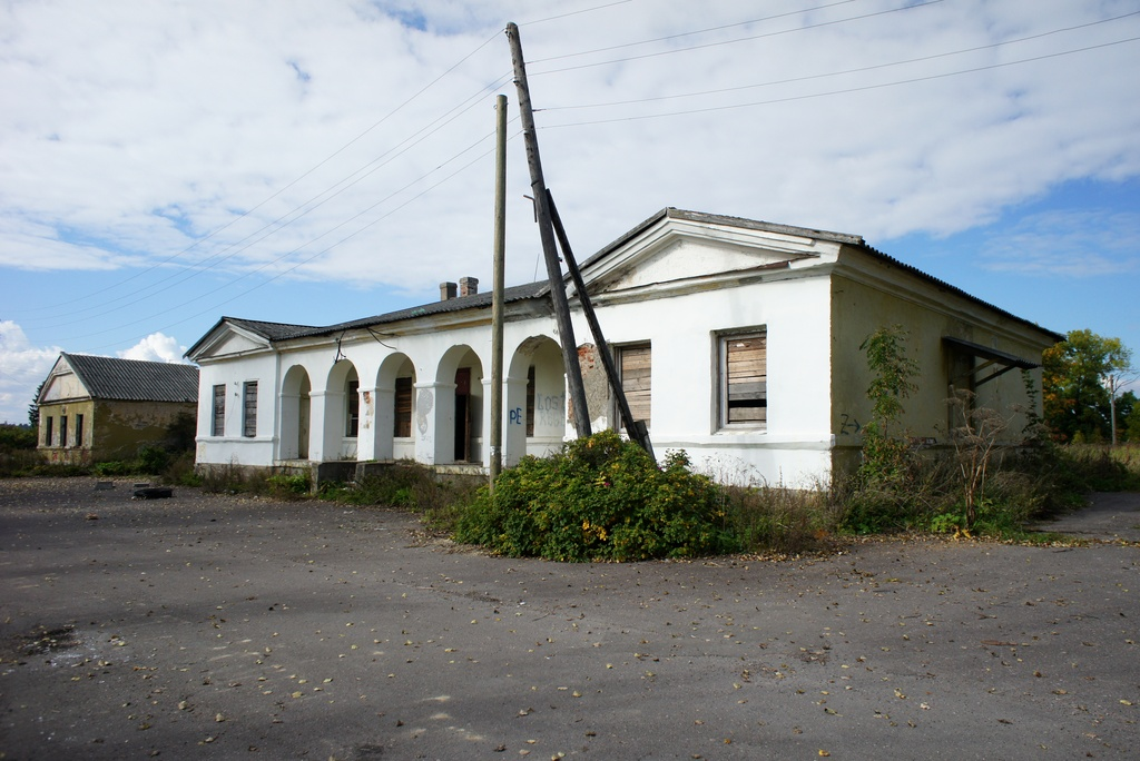 Здание почтовой станции (Санкт-Петербург и Лен.область, Волосово, деревня Каськово)